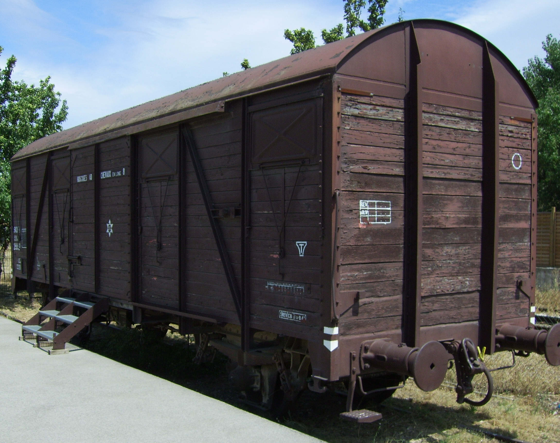 Lager Les Milles bei Aix-en-Provence. Gedenkstätte: Viehtransporter zum Abtransport von Juden Es handelt sich um einen nach gemeinsamen europäischen Standards nach dem Krieg gebauten Waggon, er ist damit nur ein Beispiel für einen gedeckten Güterwagen und hat nichts mit Deportation zu tun.